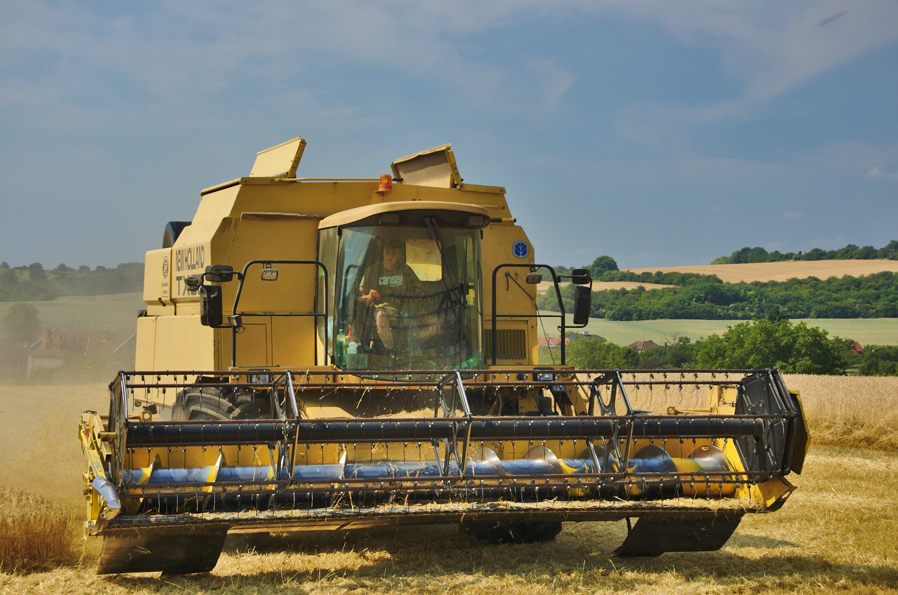 Kombajn New Holland TX68 seče pole mezi Slatinkami a Lípami, okres Prostějov